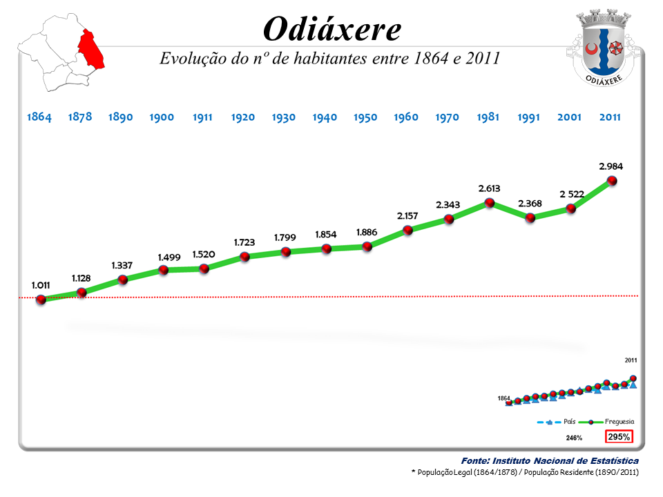 Censos 1864/2011